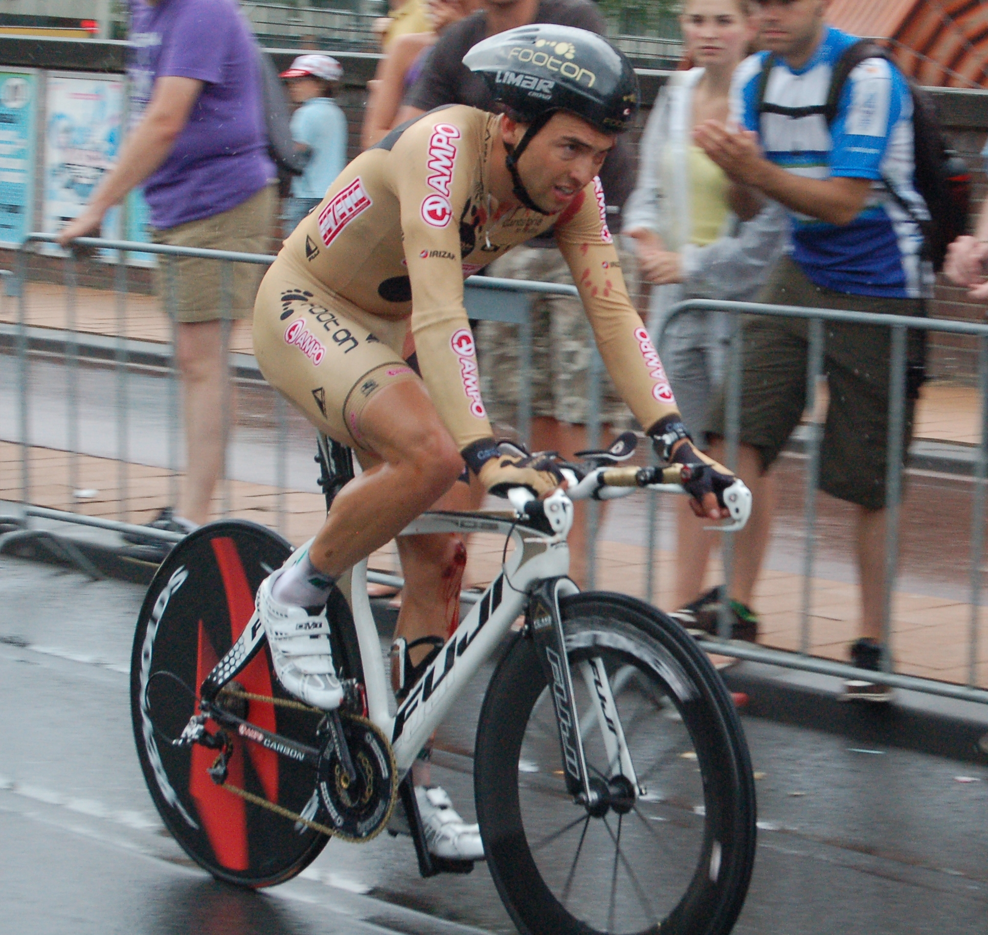 Prologue du Tour de France 2010 à Rotterdam - Manuel Cardoso